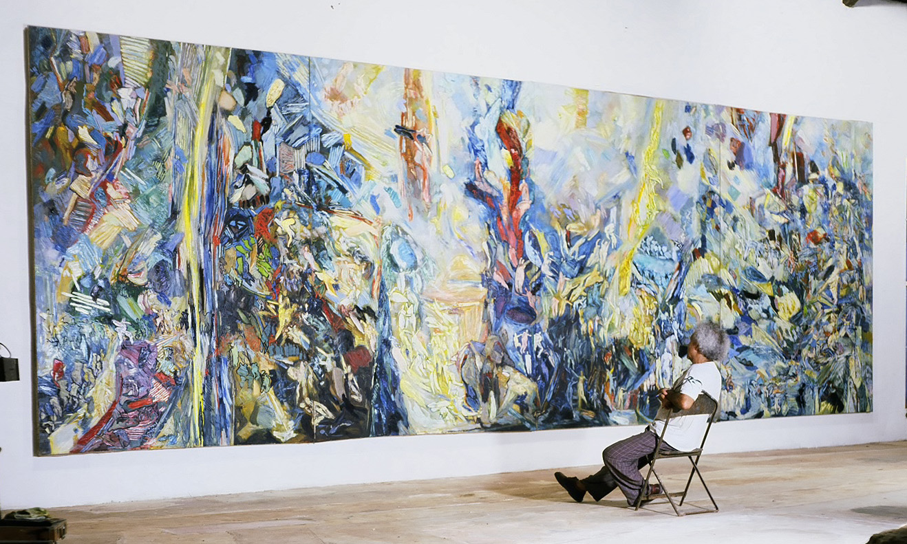 "סיפור חיי" - שמן על בד, מסדרת "מרבד הקסמים" (יושב: איתמר סיאני).